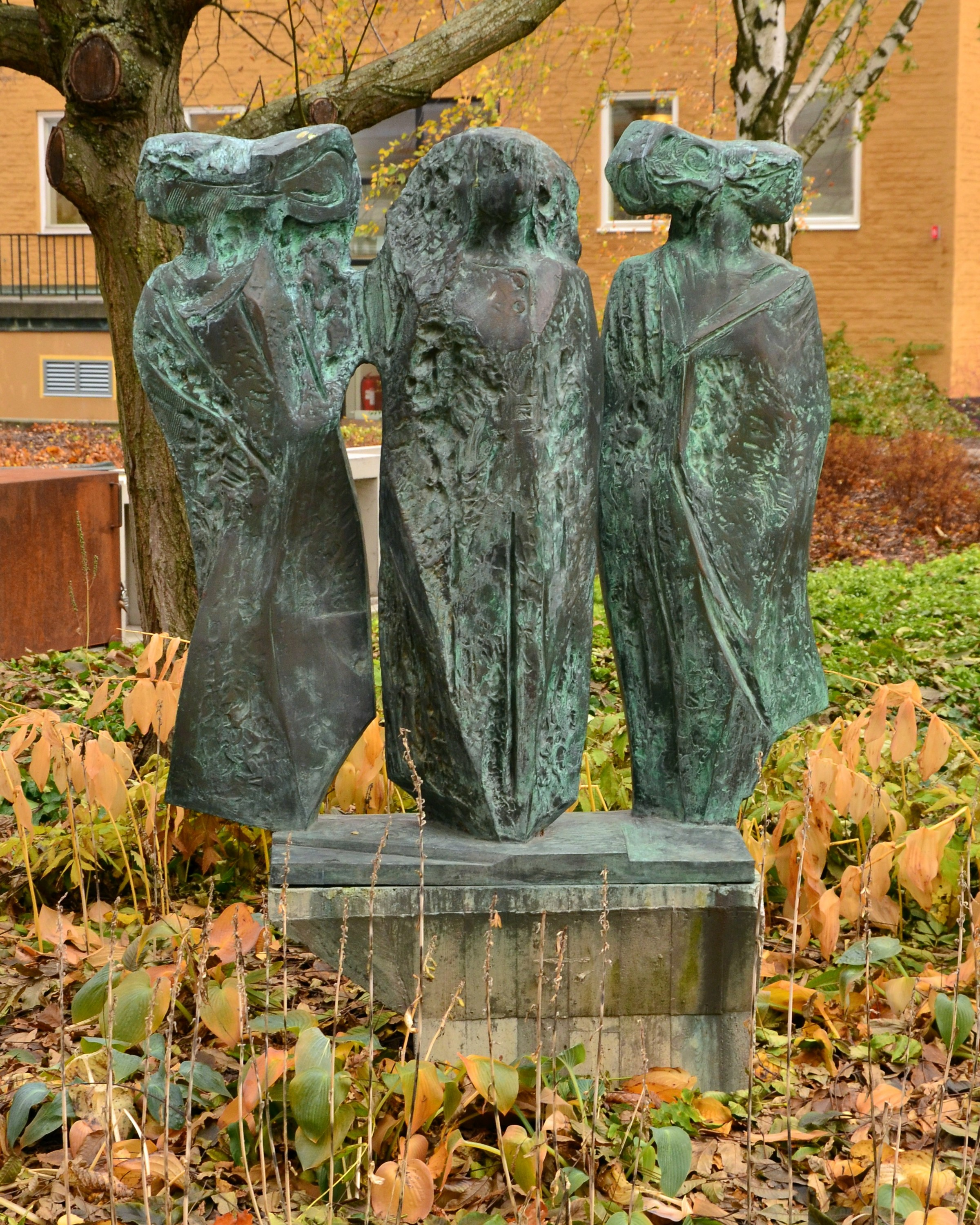 Skulpturen “Framtid Nutid Förflutet” i brons av Ebba Ahlmark-Hughes.